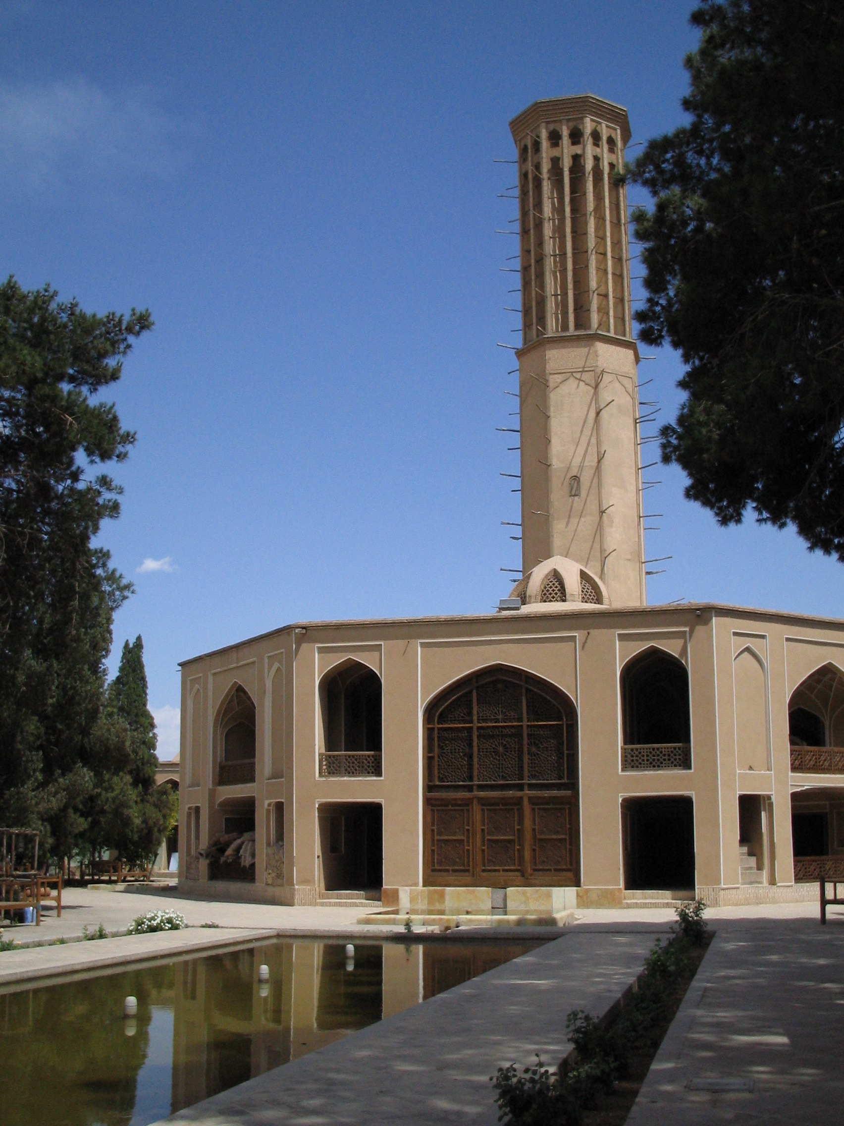 Badgir in Dolatabad Gardens, Yazd, Iran